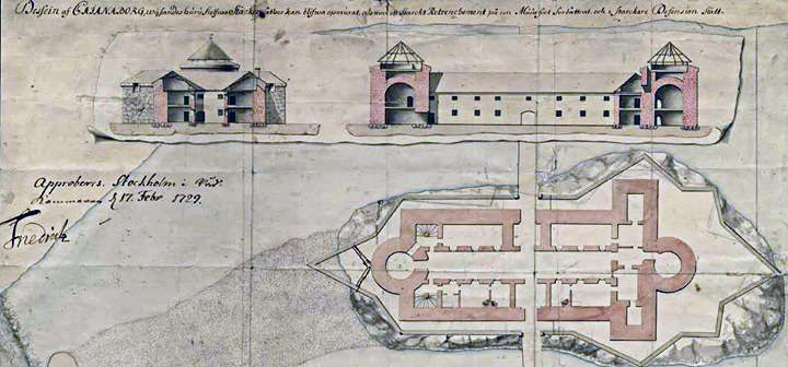 Ruotsin sota-arkistossa säilytettävä rakennuspiirrustus vuodelta 1729 koskien suunnitelmaa Kajaanin linnan uudelleenrakentamiseksi.